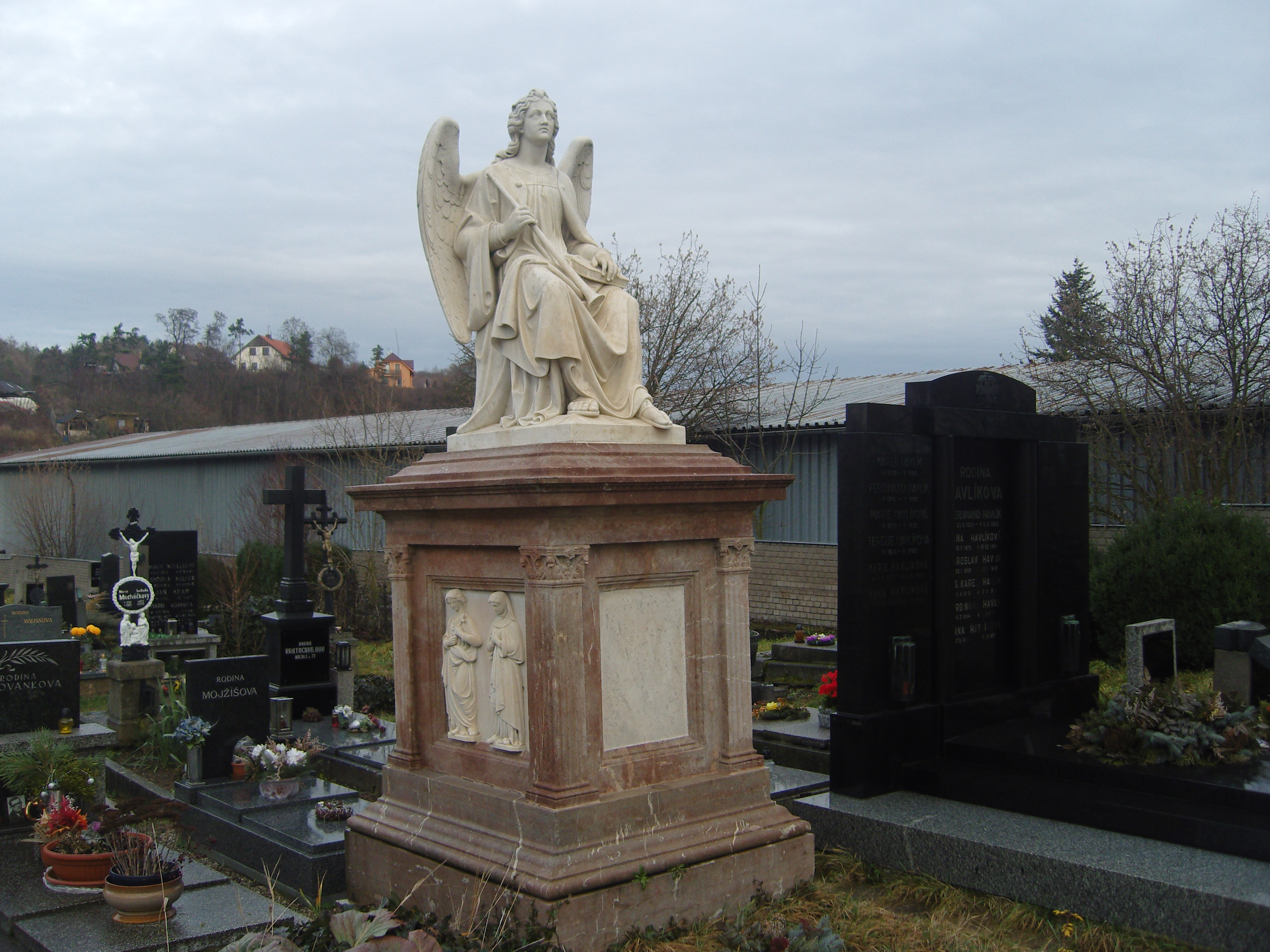 socha Václava Levého Anděl